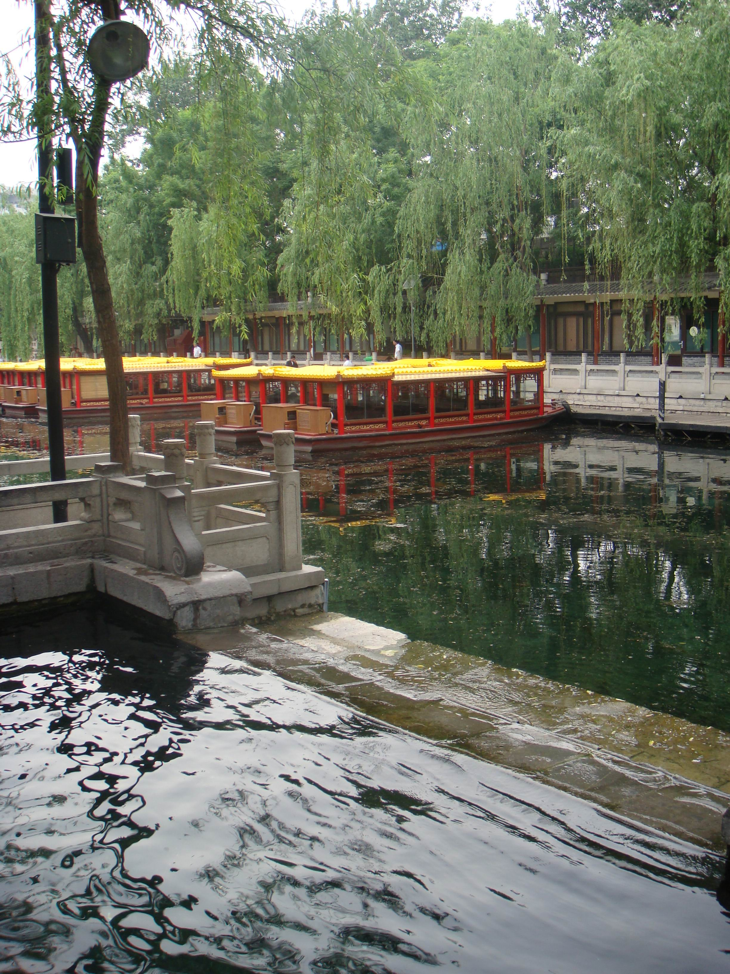 济南琵琶泉泉池，因水声淙淙，犹如琵琶扬韵而得名，济南七十二名泉之一。